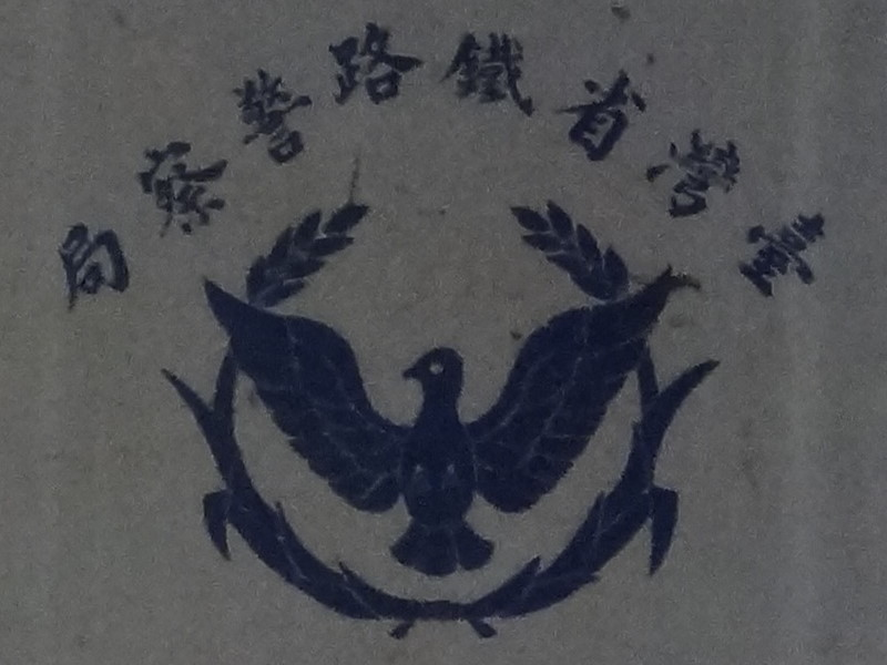 臺灣鐵路管理局中壢車站內殘留的臺灣省鐵路警察局局徽。